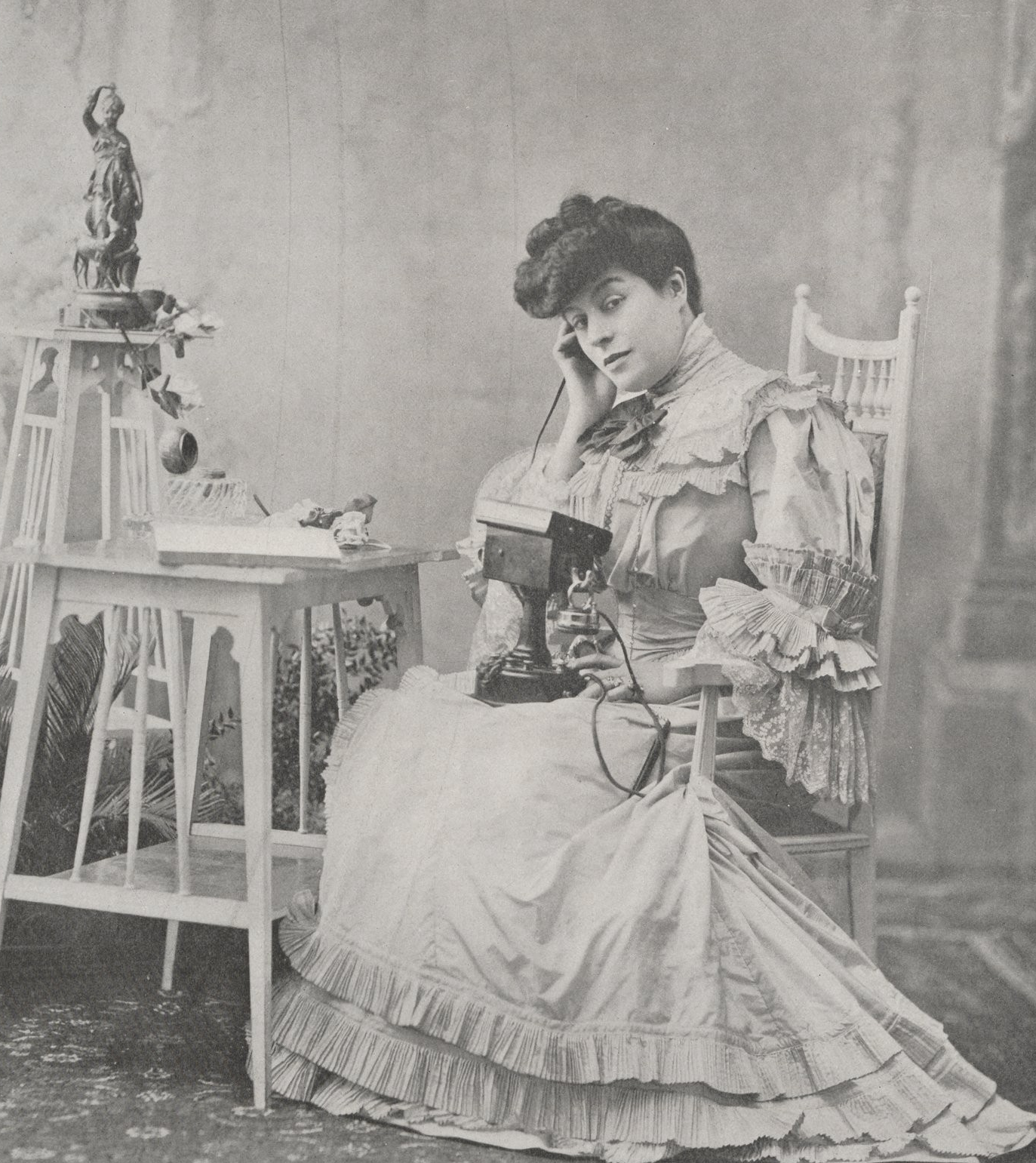 Sylviac, 1904, avec un téléphone dans une robe de la maison Armand et Martial